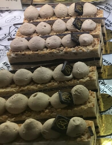 Succès au chocolat et au praliné dans une boulangerie-pâtisserie parisienne : ganache au praliné, ganache au chocolat, noisettes.